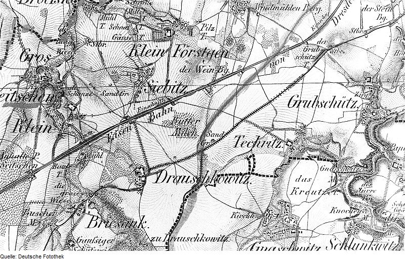 Original image description from the Deutsche Fotothek Göda-Seitschen. Oberreit, Sect. Bautzen, 1844/46